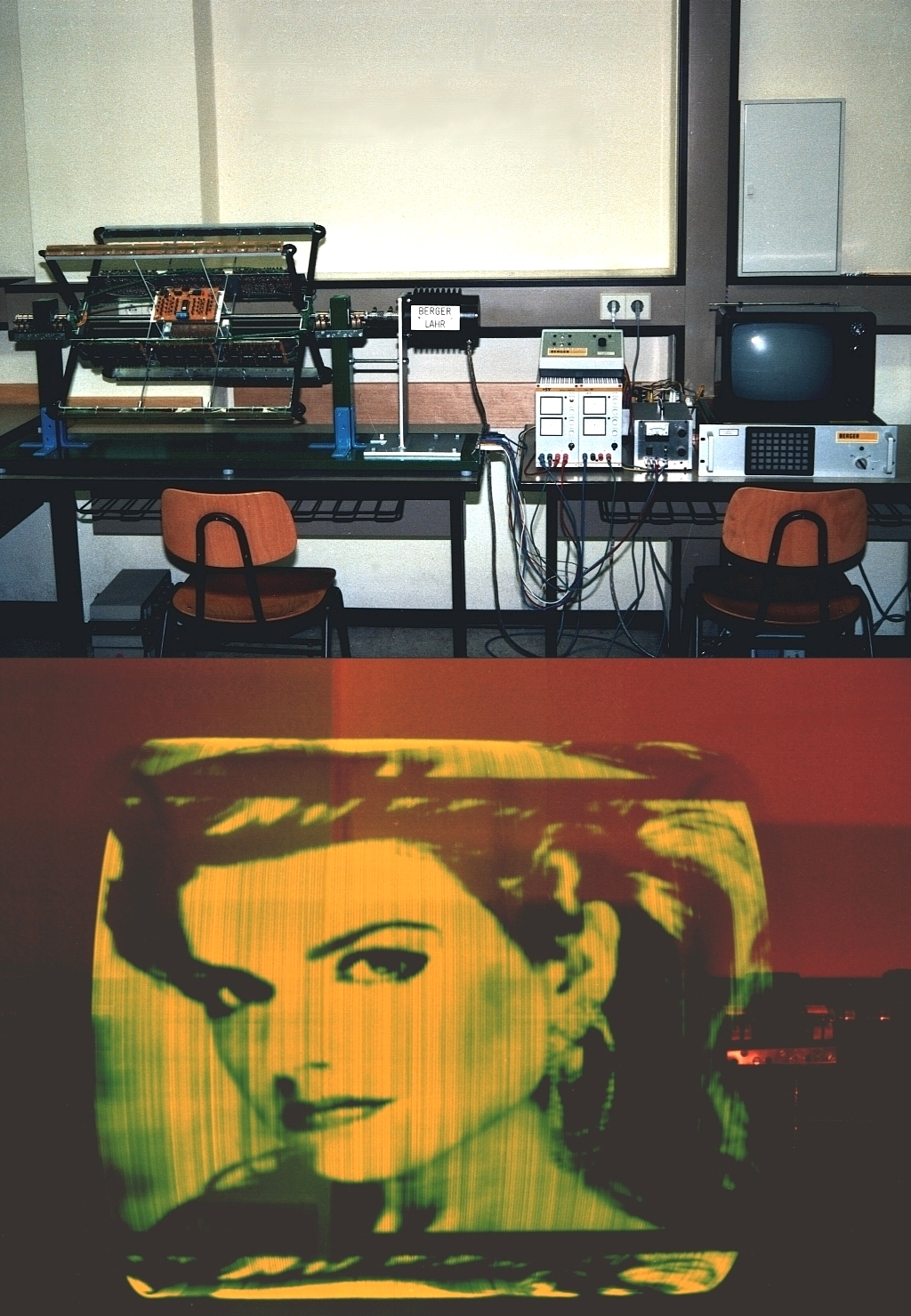 Fernsehbilderzeugung mit 4 Leuchtdiodenleisten (Television with 4 LED-Strips)